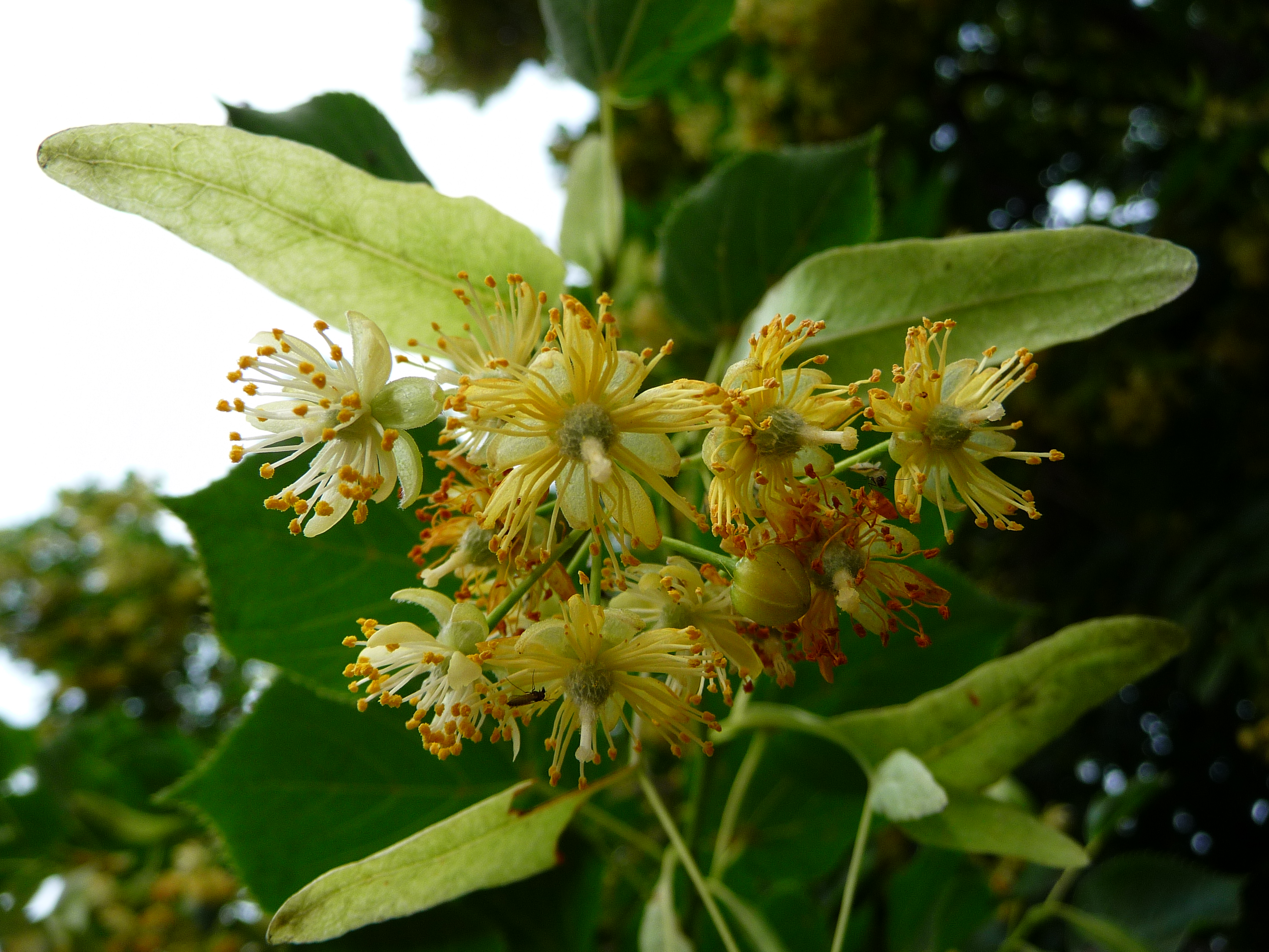 Blüten der Sommerlinde (Tilia platyphyllos)